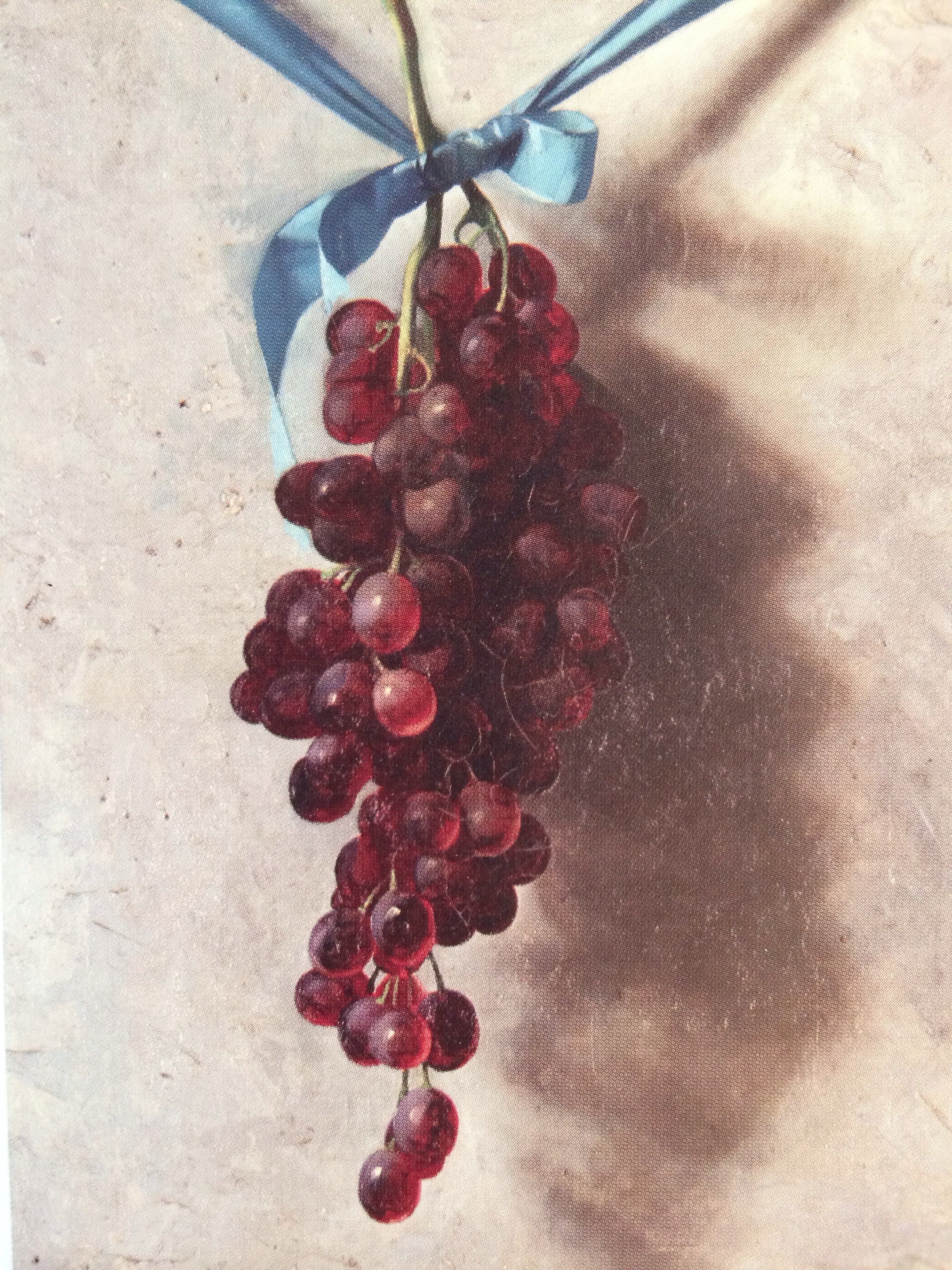 Domenec_Doberano. Natura Morta. 1897